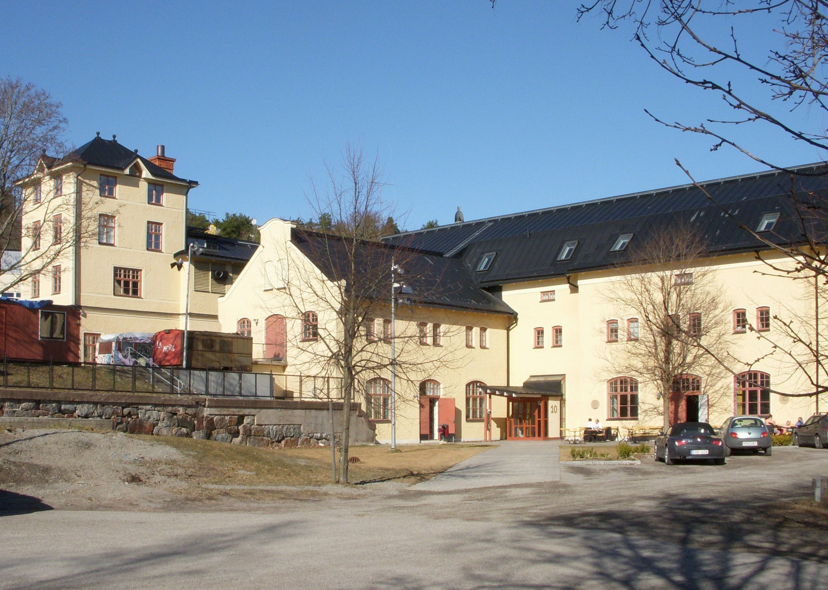 Alby gård, Botkyrka, ladugårdskomplexet Suptopia